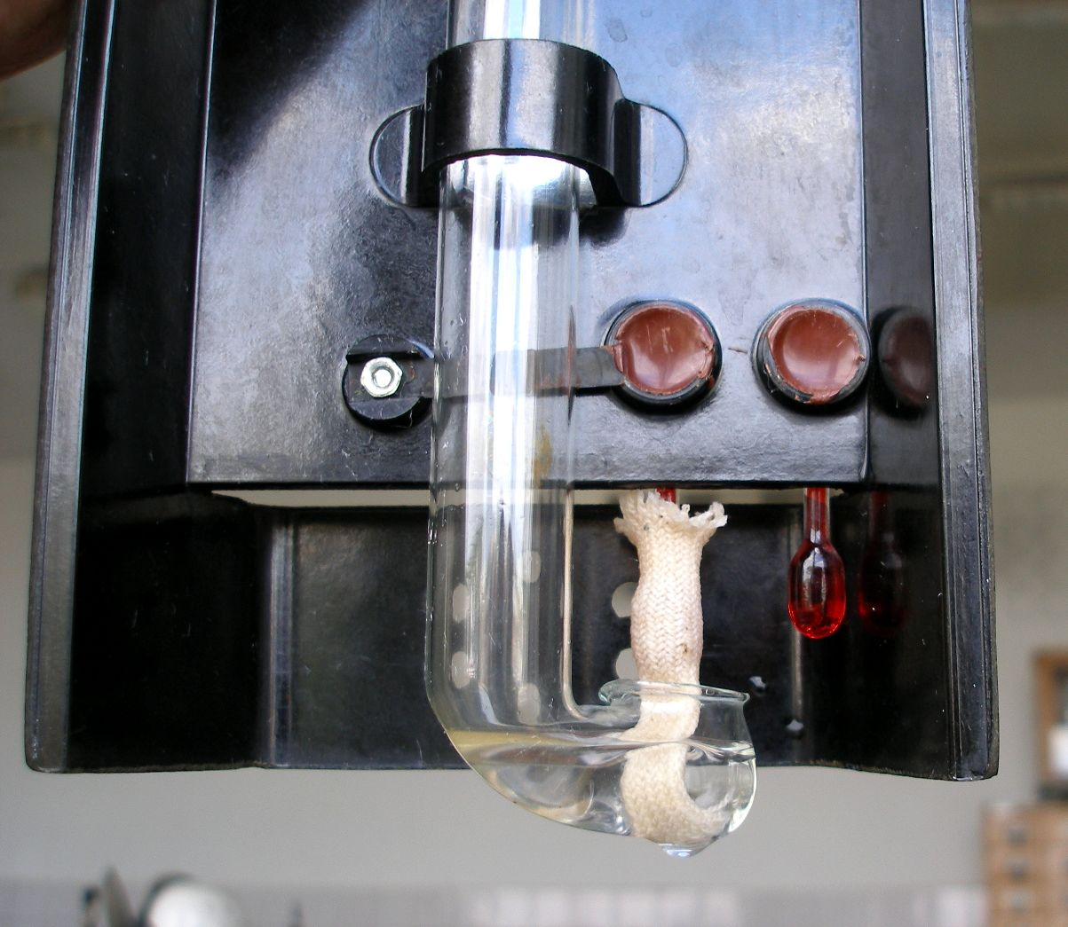 Psihrometra slapjais un sausais termometrs.